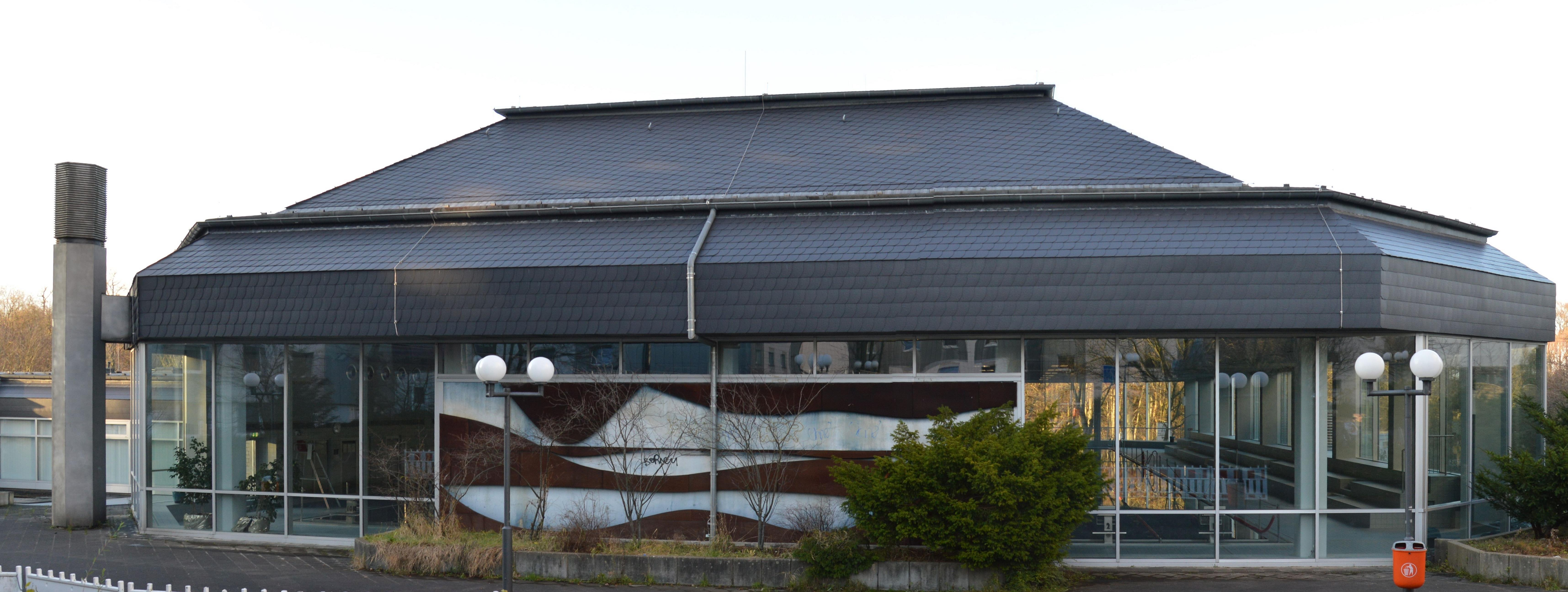 Unibad Bochum im Uni-Center in Bochum-Hustadt, einem Neubauviertel im Stadtteil Bochum-Querenburg